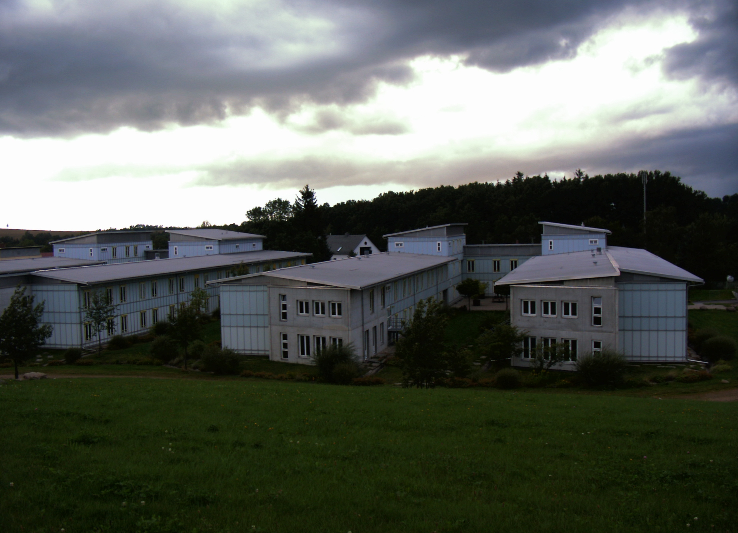 Ausbildungszentrum Bobritzsch, Internatsgebäude 1 und 2